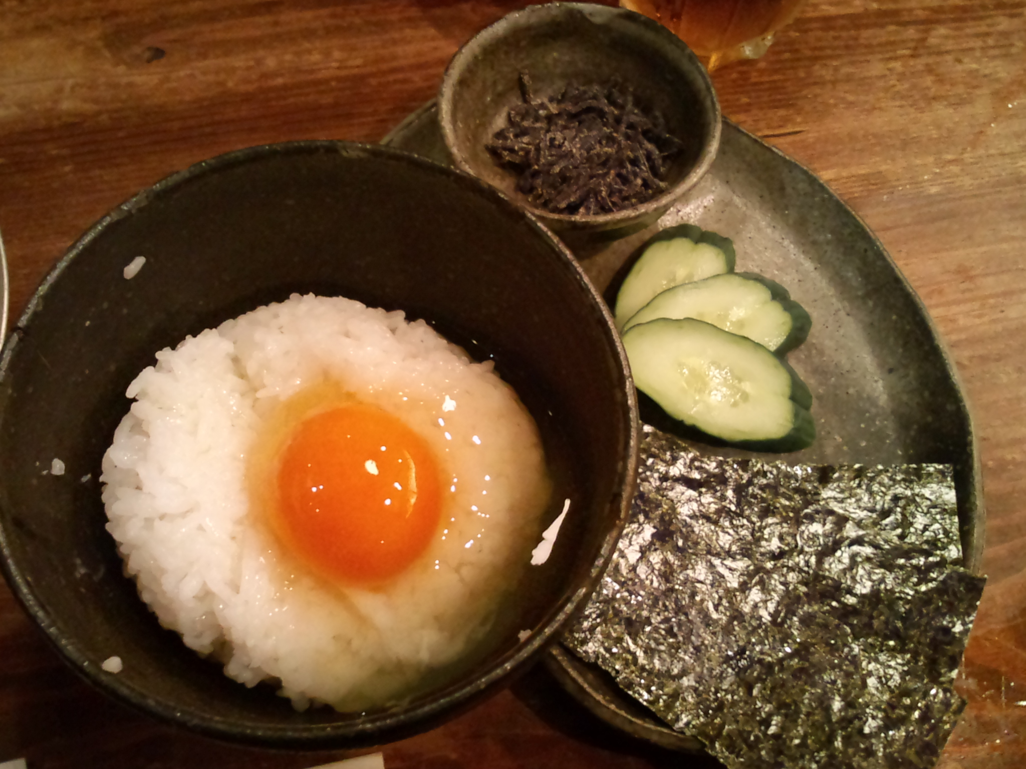 卵かけご飯（京都市下京区烏丸通塩小路下ル東塩小路町901 京都駅ビル（JR京都伊勢丹ビル）10Fにあるフードテーマパーク京都拉麺小路内の、ラーメン店「宝屋」[1]京都駅ビル店の料理「出町の玉子かけご飯」。「醤油なしで塩昆布で食べます。まいうー！」）